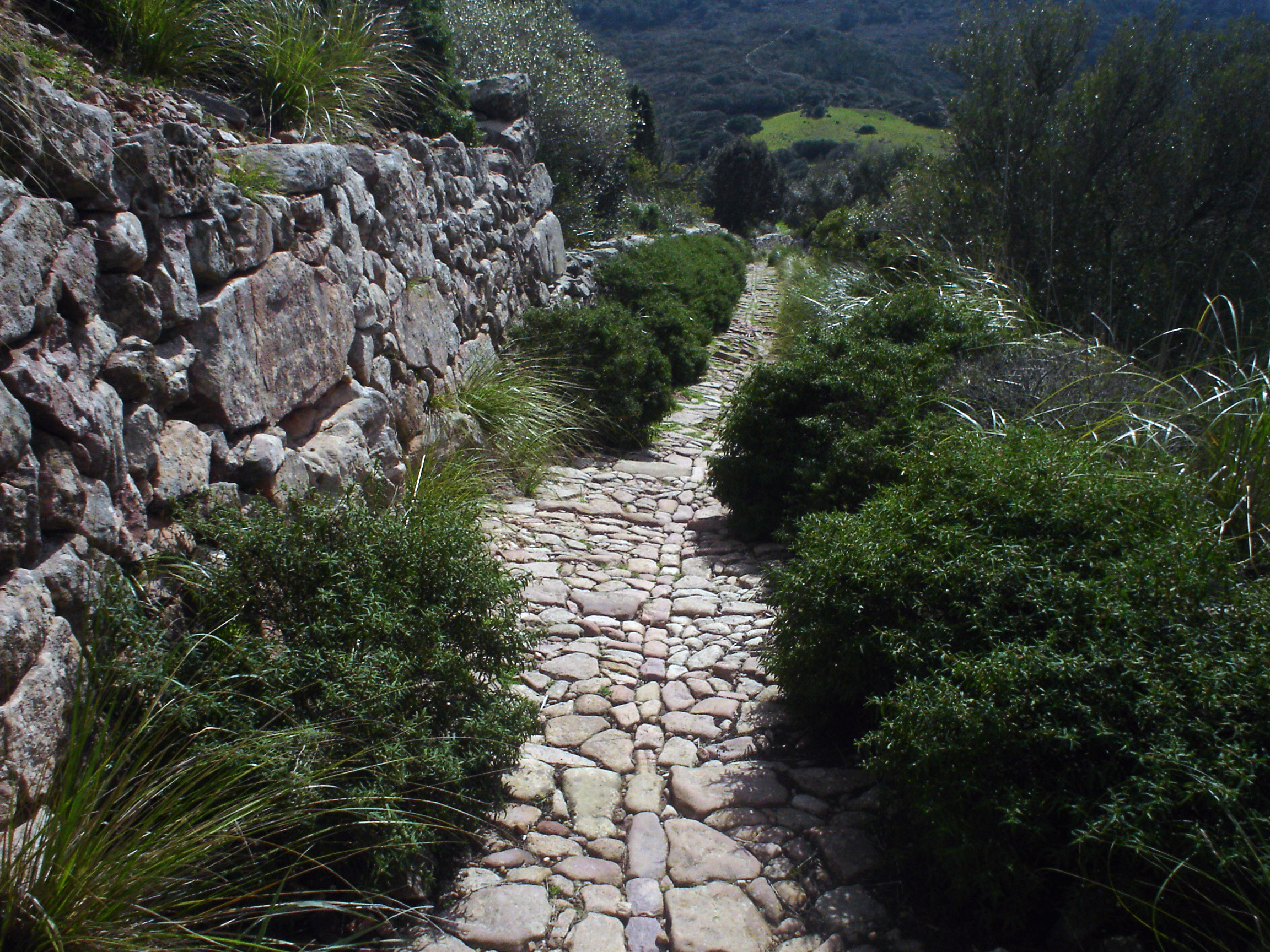 Author: Francisco Valverde Taken at Santa Àgueda (Minorca)